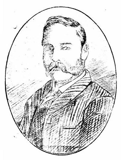 George Yule